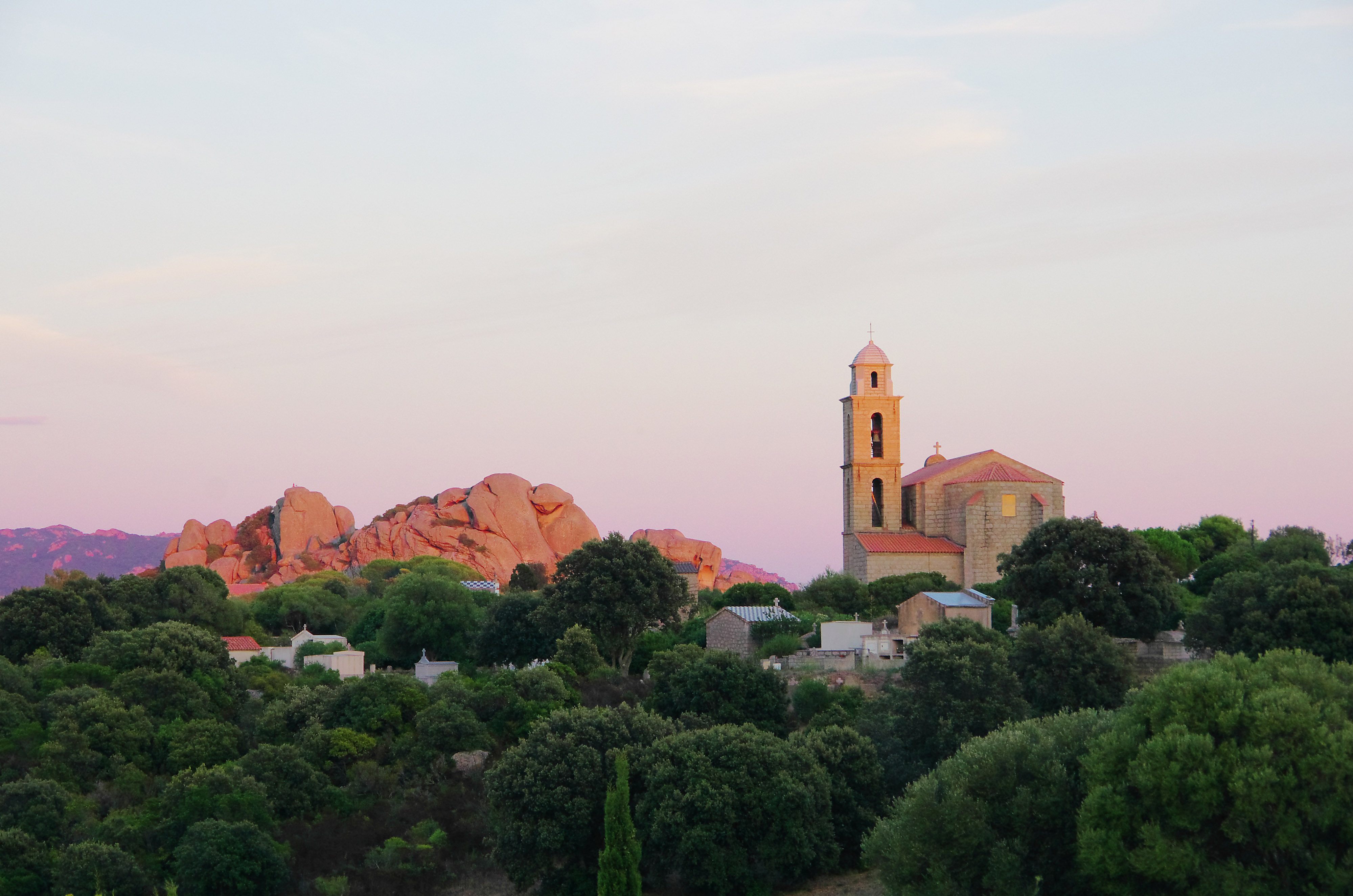 Eglise de Caldarello (Corse)